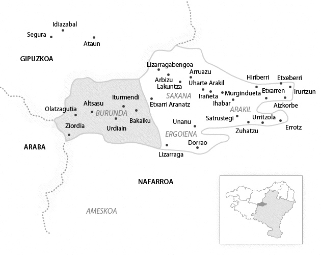 Burunda, Euskal Herriko mapan